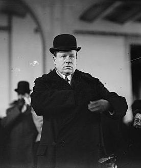 Henry Symes Lehr